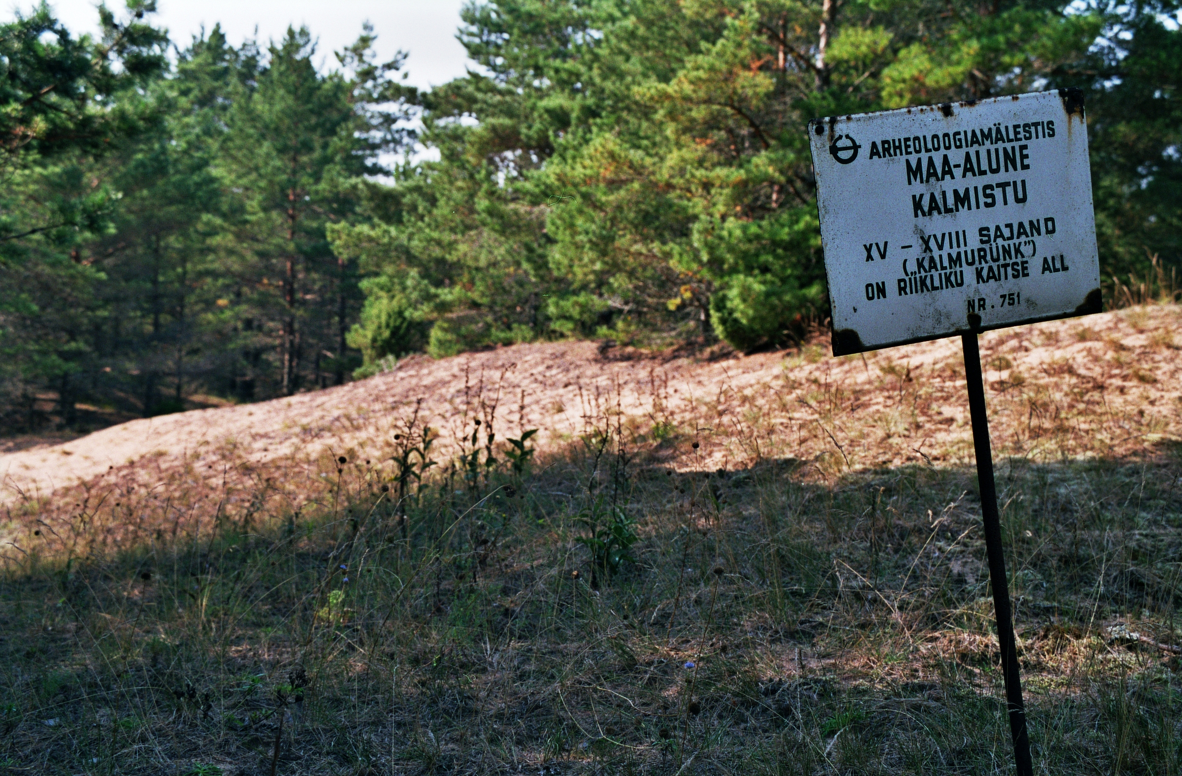 Kalmistu "Kalmurünk"